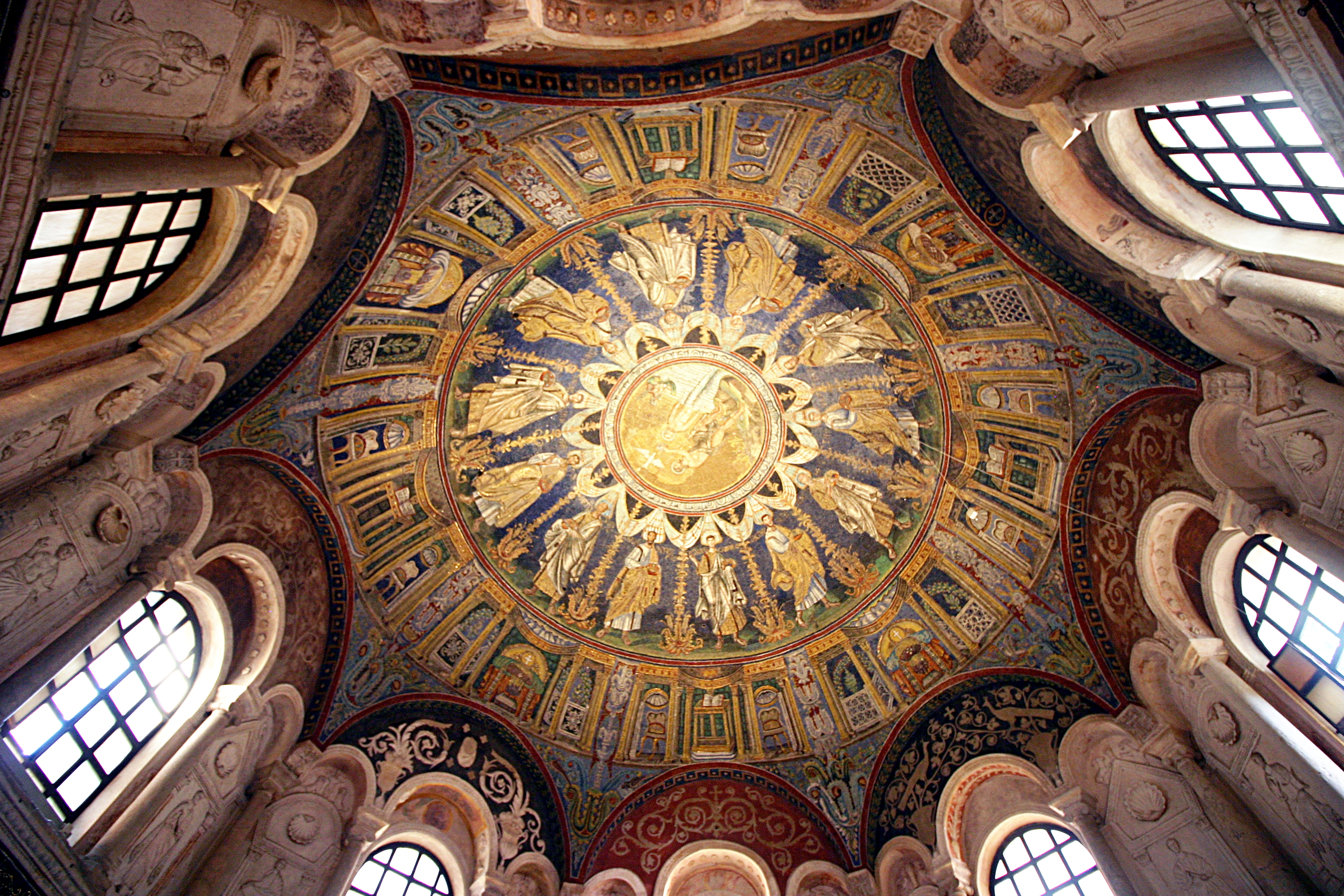 Baptistry of Neon (Ravenna) - Mosaics